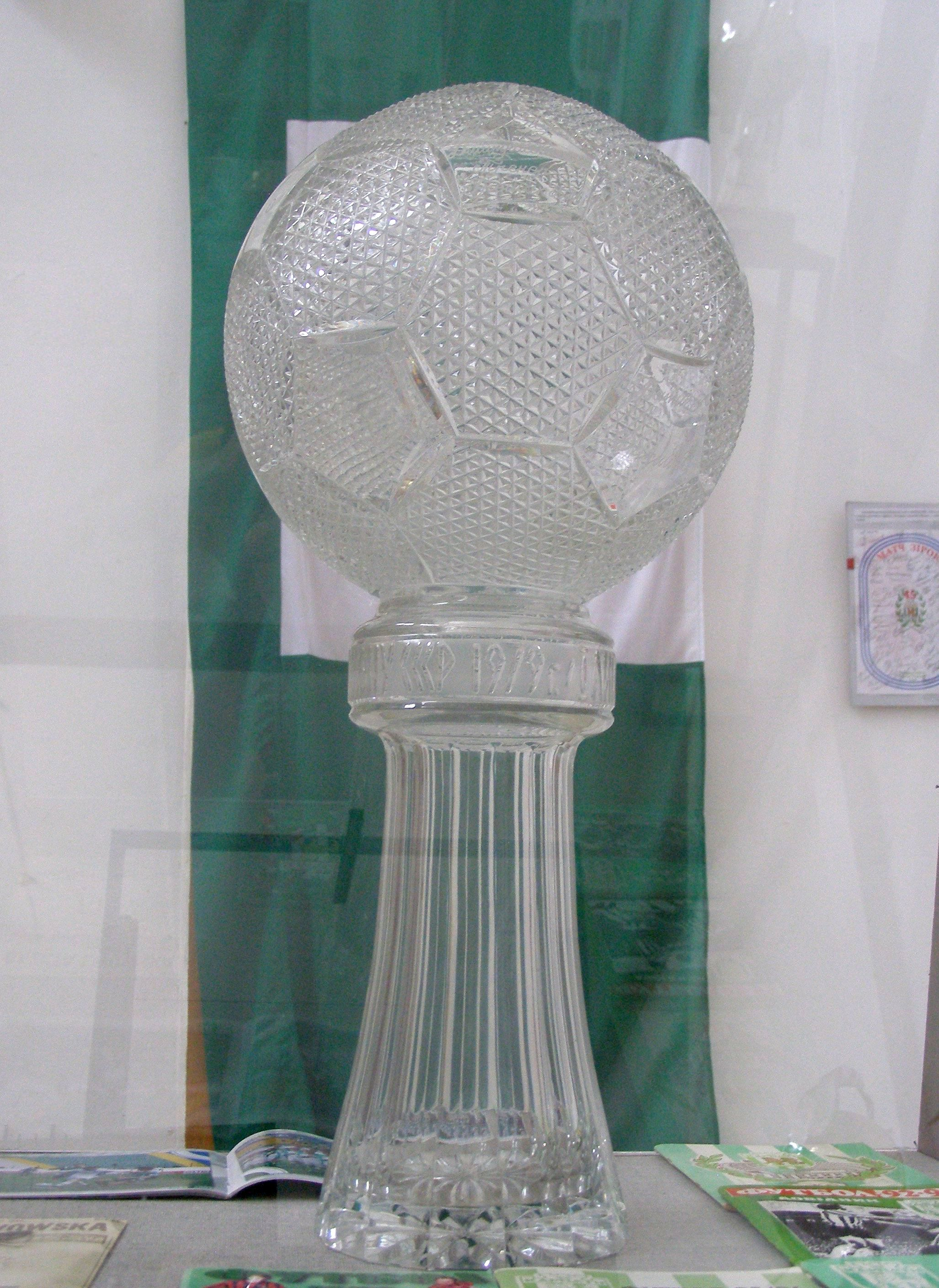 Auszeichnung für Karpaty Lwiw als Sieger der 1. sowjetische Liga (Saison 1979)